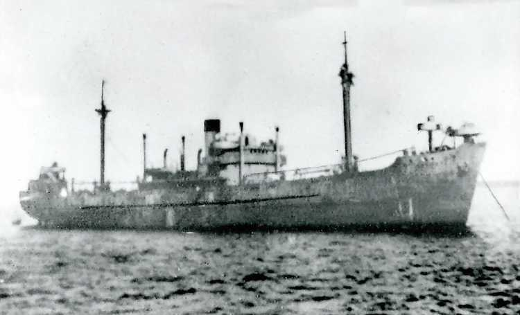 Deutscher Einheitsfrachter vom Typ Hansa B